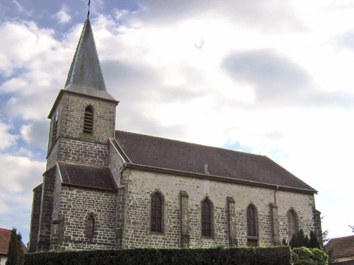 Eglise Saint-Pierre-aux-Liens